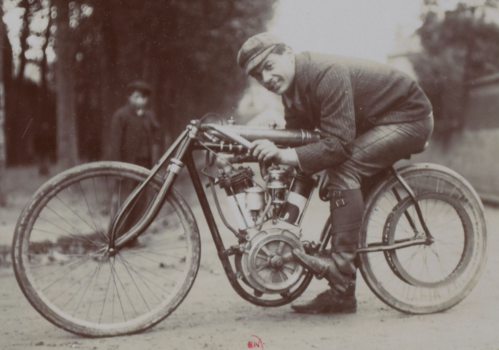 [Collection Jules Beau. Photographie sportive] : T. 32. Année 1906 / Jules Beau : F. 46. [Kilomètre lancé, Dourdan, 21 octobre 1906]